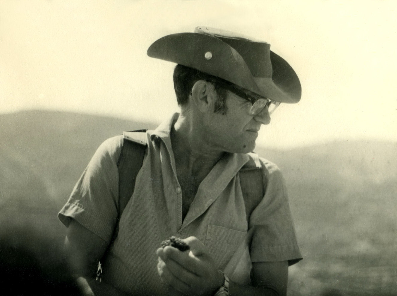 יצחק שלו משורר וסופר, אביו של מאיר שלו התמונה צולמה בתחילת שנות ה-70 של המאה העשרים במסגרת טיולים שהוא ערך שנקראו טר"ש, טיולי רבנו שלו